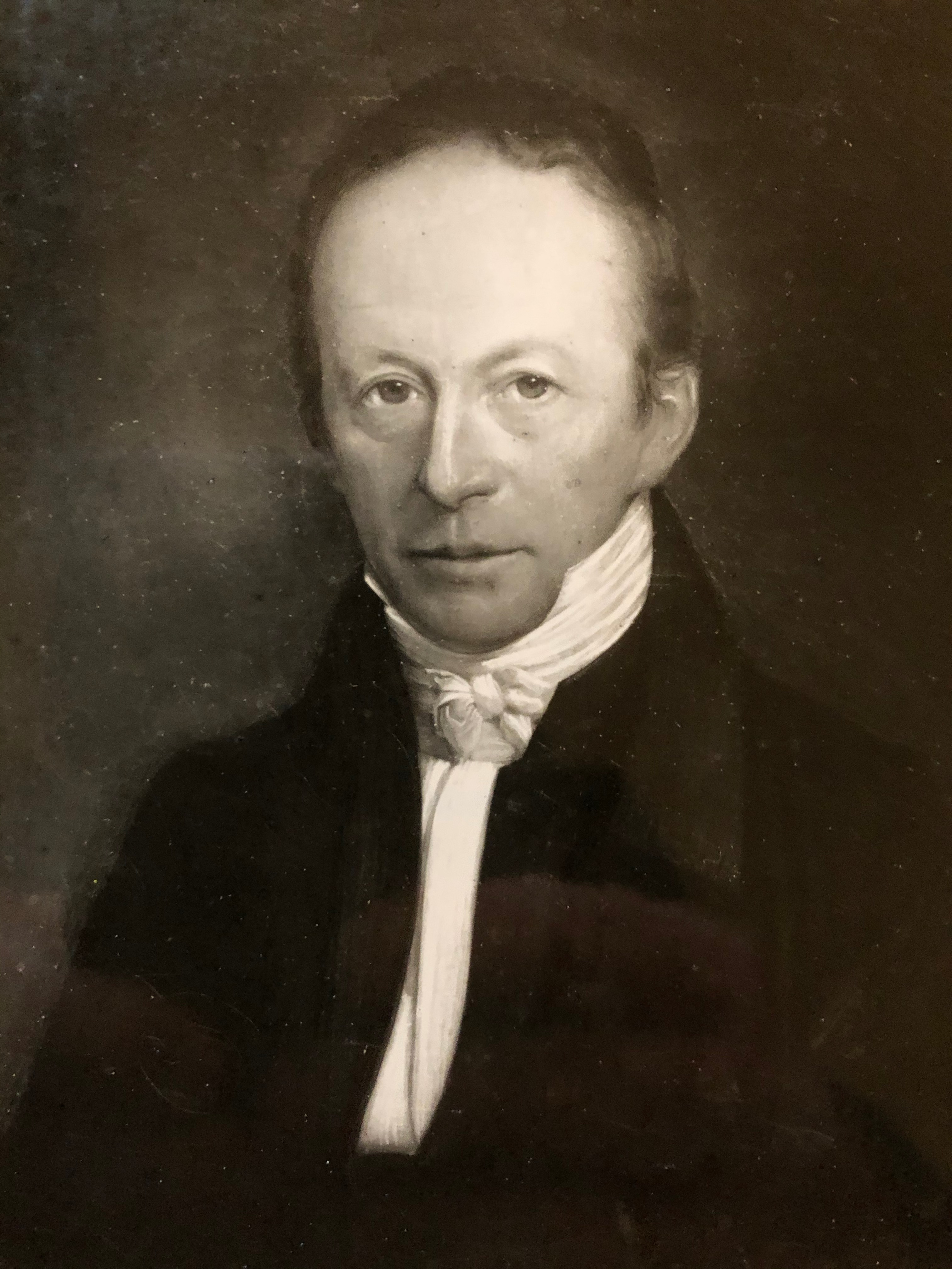 Bild entstammt Buch von Alexander Dietz: Die Geschichte der Familie Andreae - Frankfurter Zweig, Frankfurt am Main 1923 Da in dem Buch kein anderer Urheber genannt ist, zeichnet Alexander Dietz selbst als Urheber verantwortlich. Er ist seit mehr als 70 Jahren verstorben. Als Jurist und Notar kann er zudem als juristische Person gelten. - Johannes (Jean) Andreae